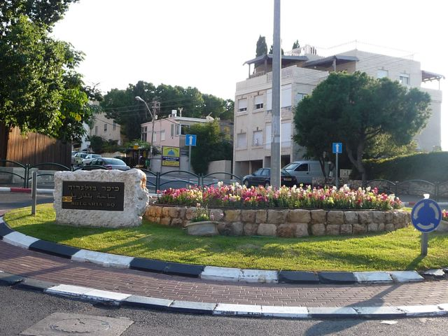 כיכר כבוד לעם הבולגרי על הצלת יהדות בולגריה.